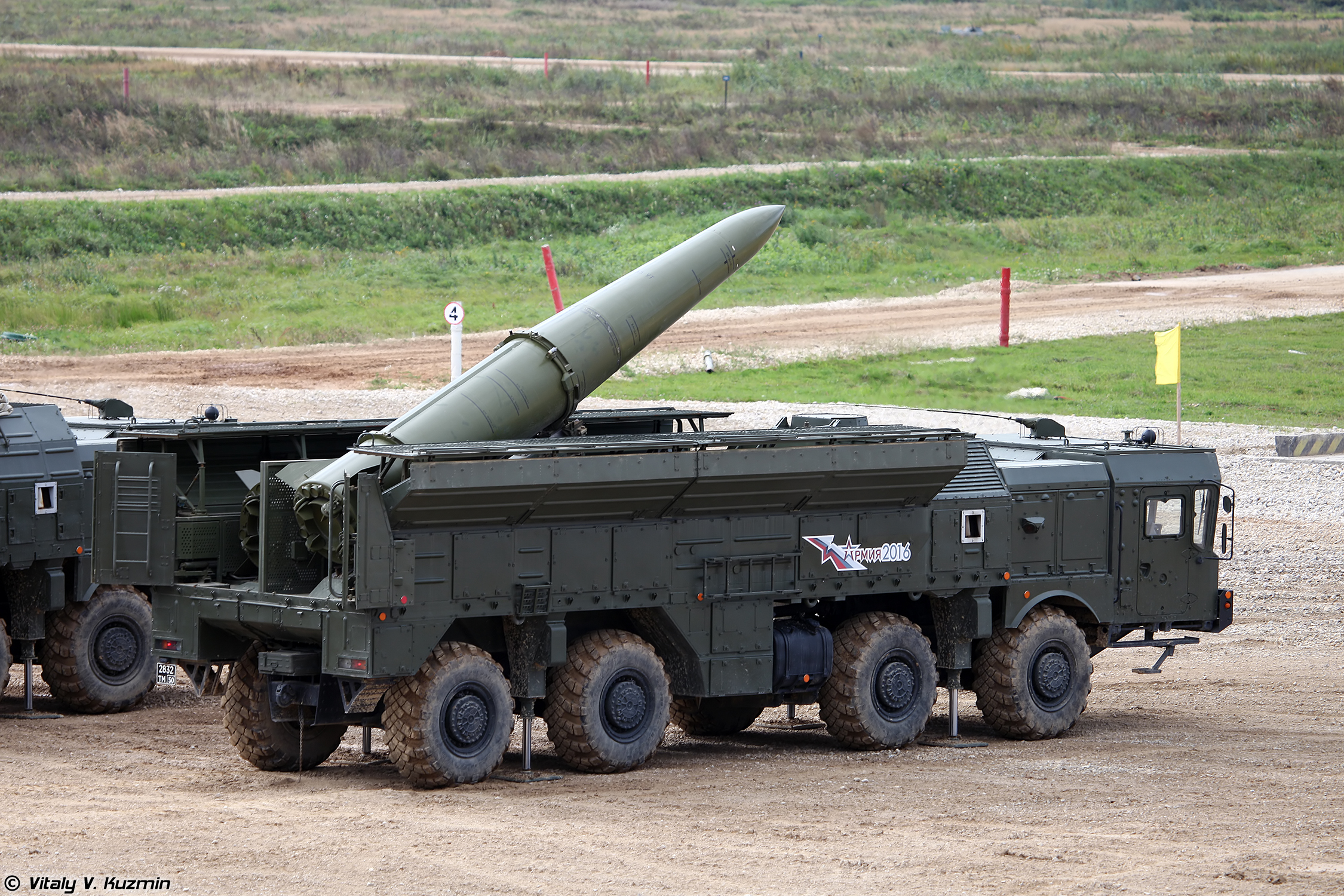 Самоходная пусковая установка 9П78-1 ОТРК 9К720 Искандер-М с ракетами 9М723К5 (9P78-1 TEL of 9K720 Iskander-M SRBM system with 9M723K5 missiles)